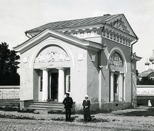 Кордегардия (Петербургская застава)